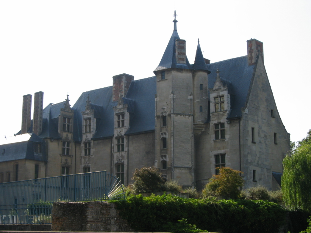 Bâtiment de l'évêché d'Evreux, abritant le musée d'Évreux (Eure)